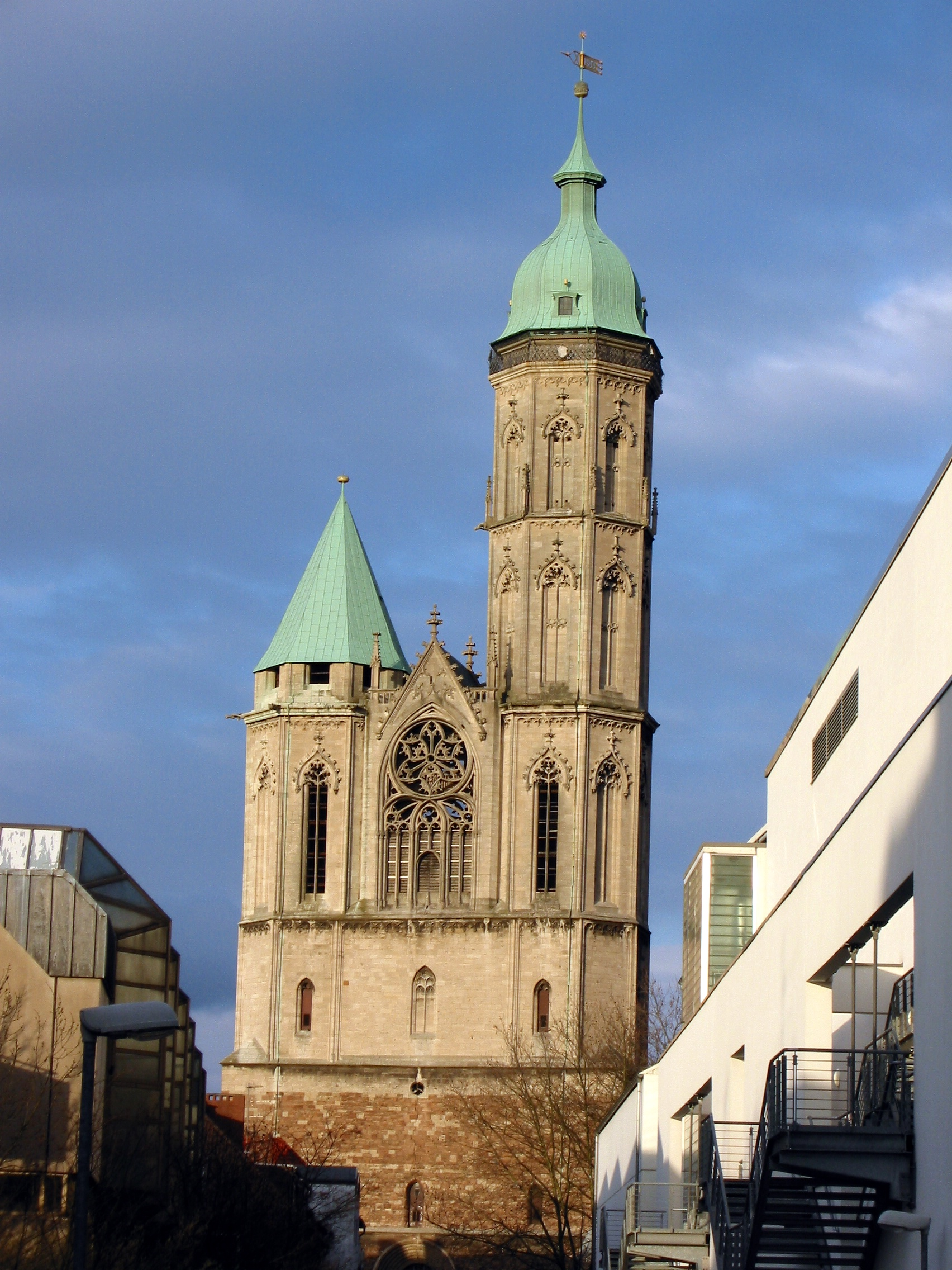 Braunschweig, St. Andreaskirche